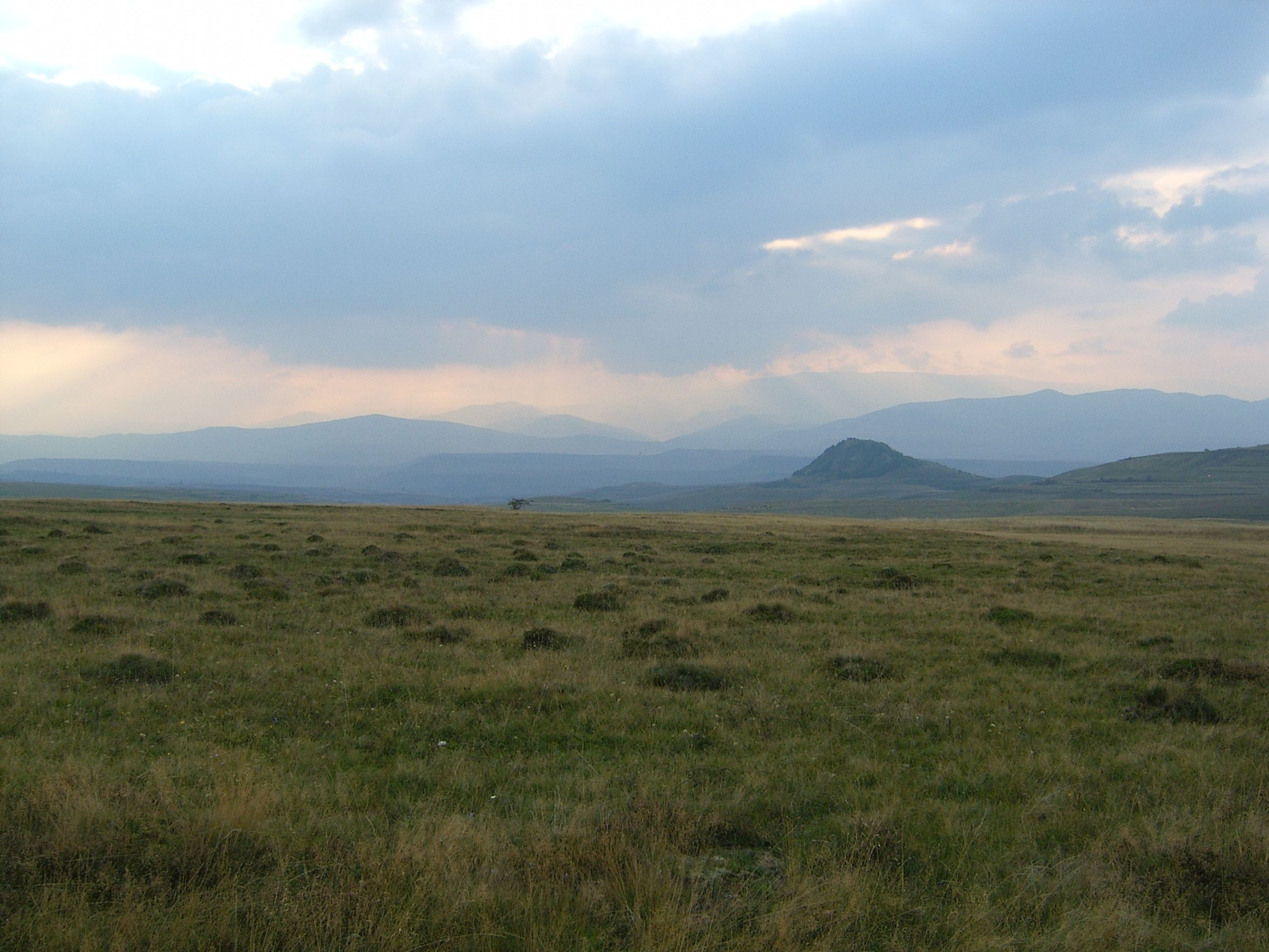 Vlegyásza-hegység (Erdélyi-középhegység)